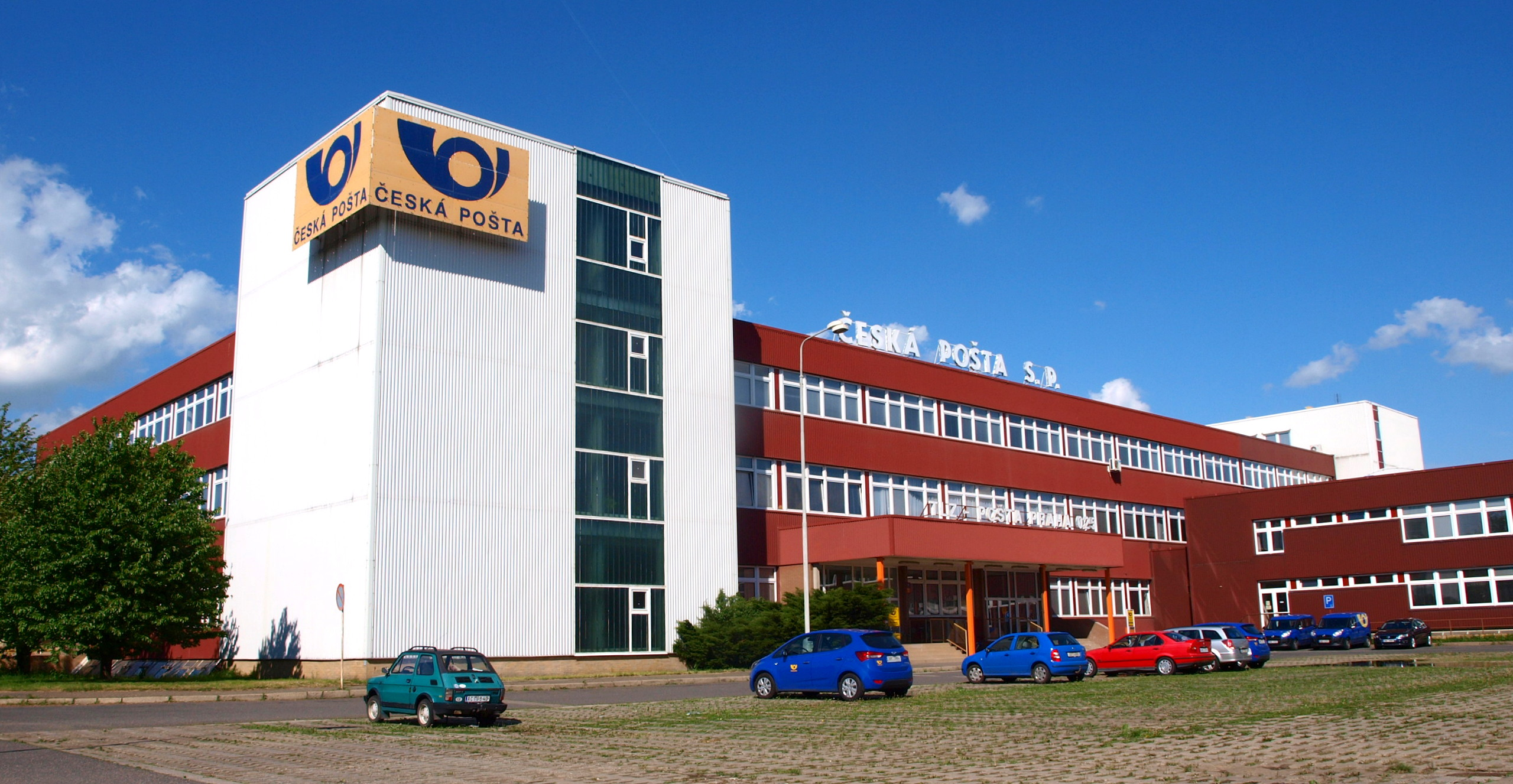 Malešice